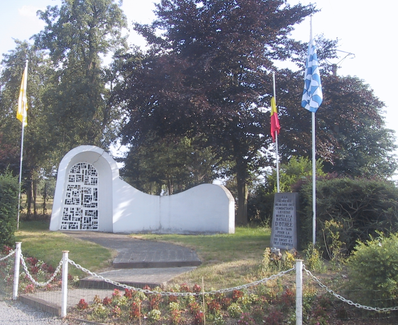 Monument de la bataillée d'Othée, rue Maurice Duchêne à Othée, Belgique